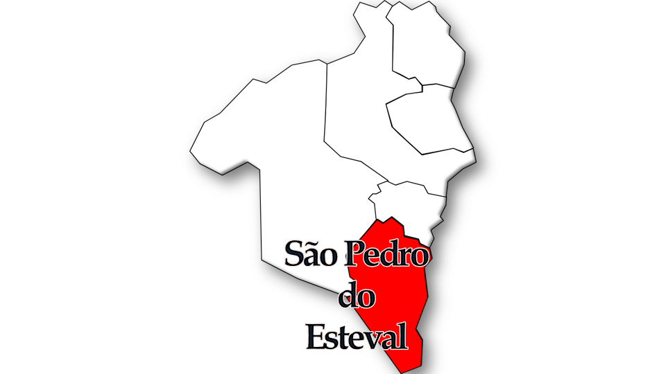 População